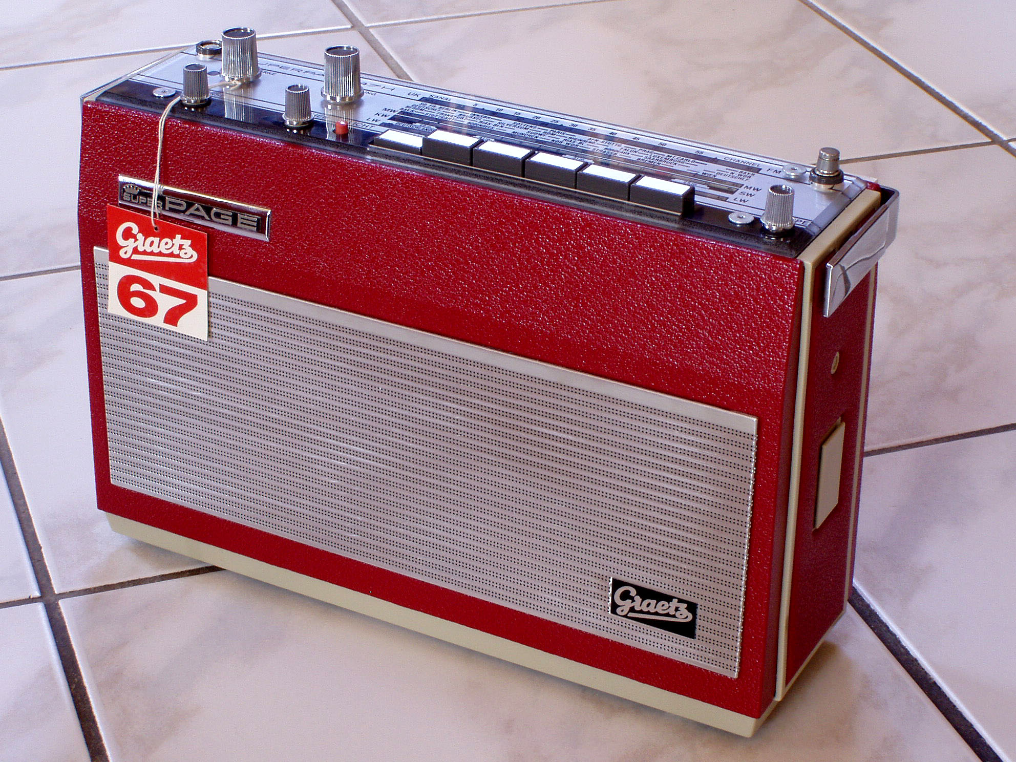 Graetz SuperPage - Spitzenmodell der Graetz Kofferradios aus dem Jahr 1967.